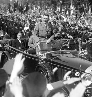 Der Feiertag der nationalen Arbeit der 1. Mai im Lustgarten in Berlin! Der Führer Reichskanzler Adolf Hitler, trifft von riesigem Jubel empfangen auf der Maikundgebung der Judend im Lustgarten in Berlin ein. Im Wagen sitzend, Vizekanzler von Papen.